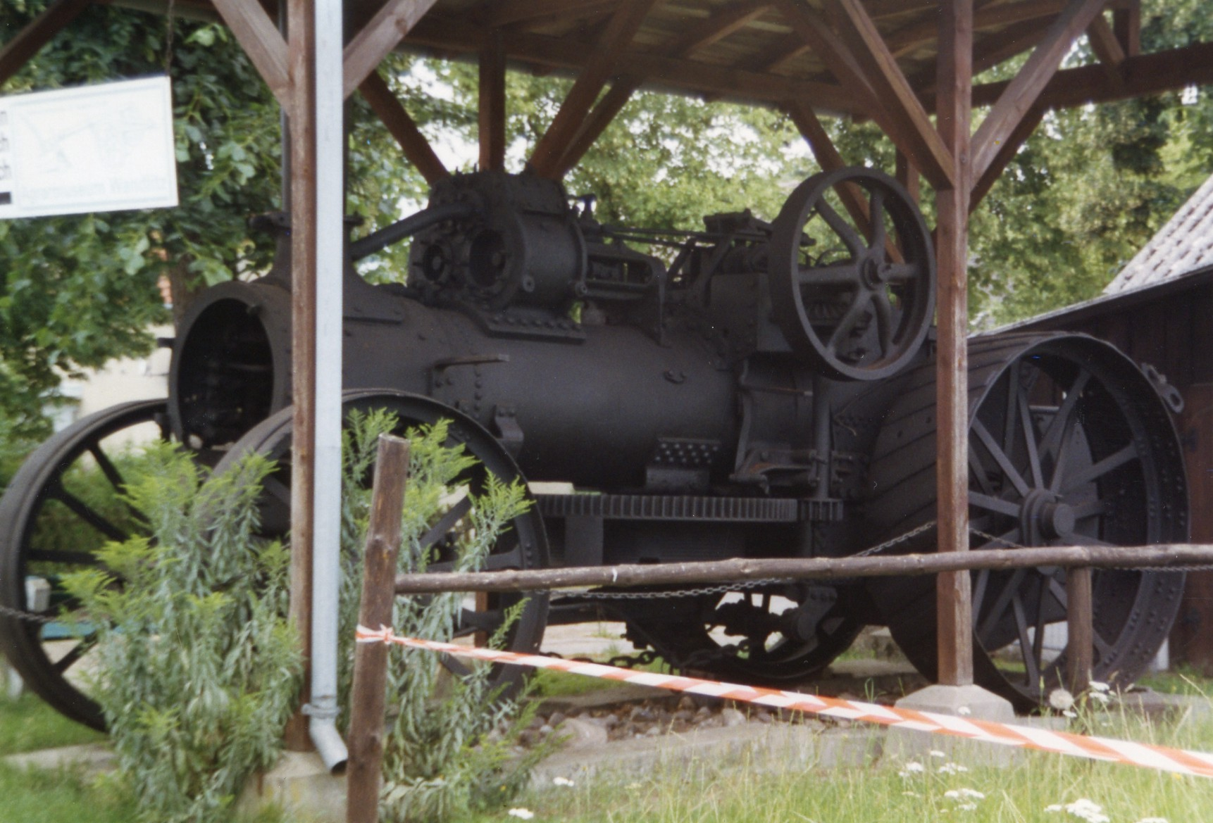 Ortsteil Wandlitz der Gemeinde Wandlitz – Heucke-Dampfpfluglokomotive (Lokomobile, vor/um 1900 gebaut) als Exponat des Agrarmuseums